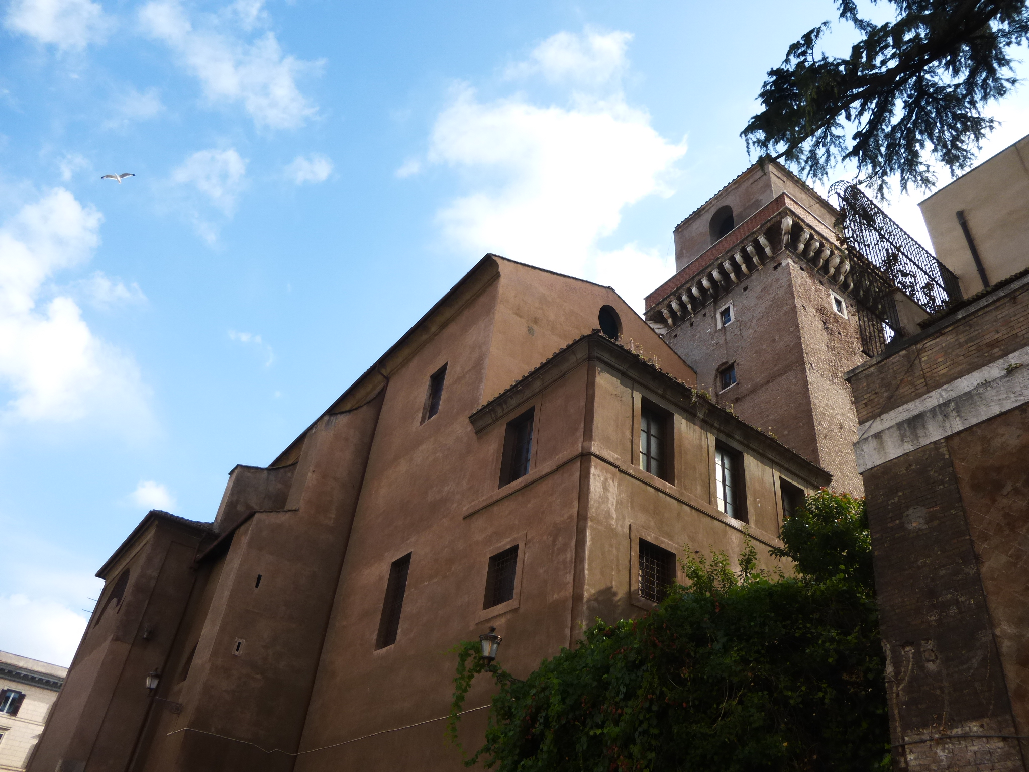 Roma, via del Fagutale, collegio Maronita e torre dei Margani.